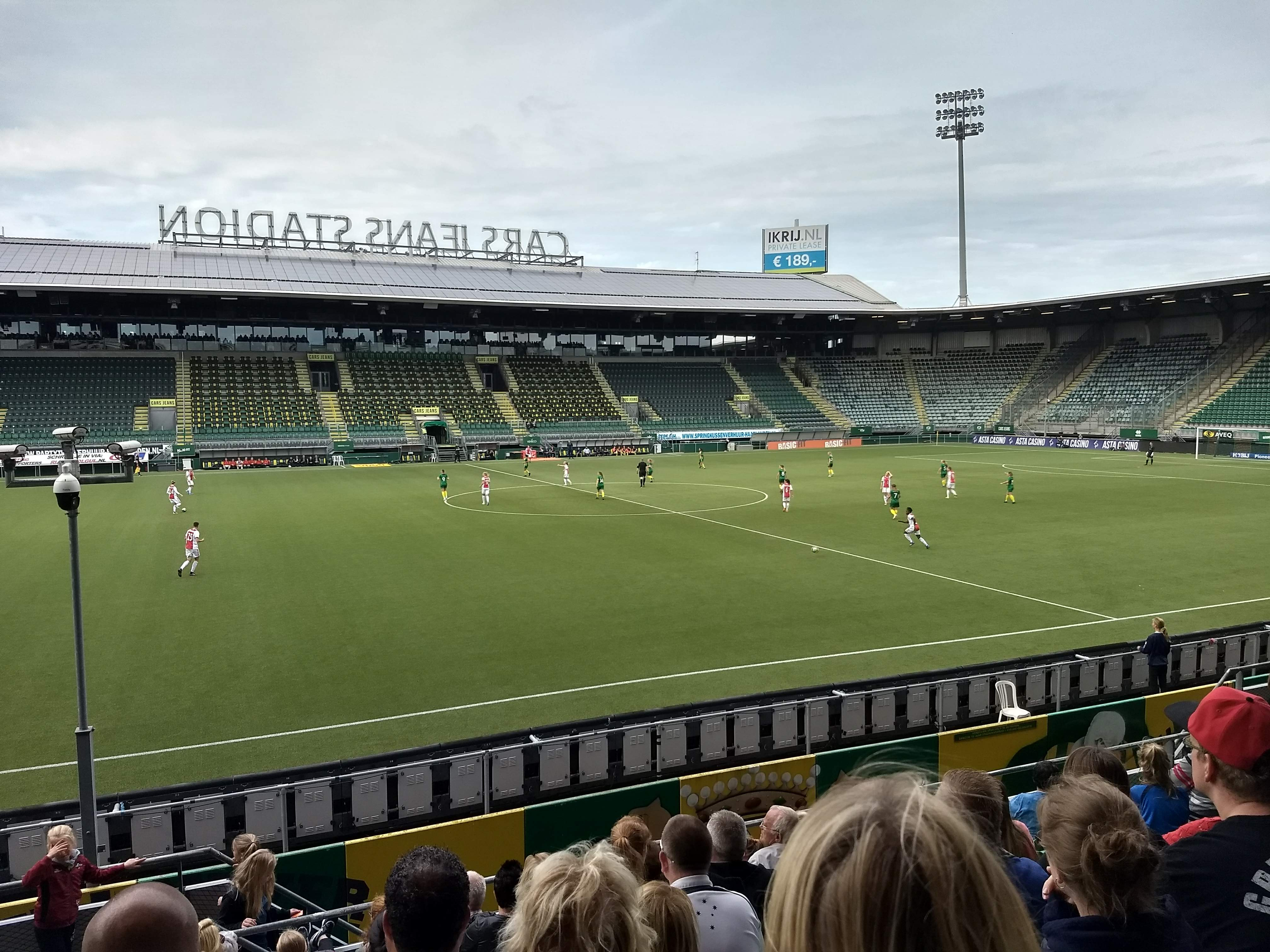 ADO Den Haag - Ajax (2-1, 2-2) - 2018-09-16 @ Cars Jeans Stadion